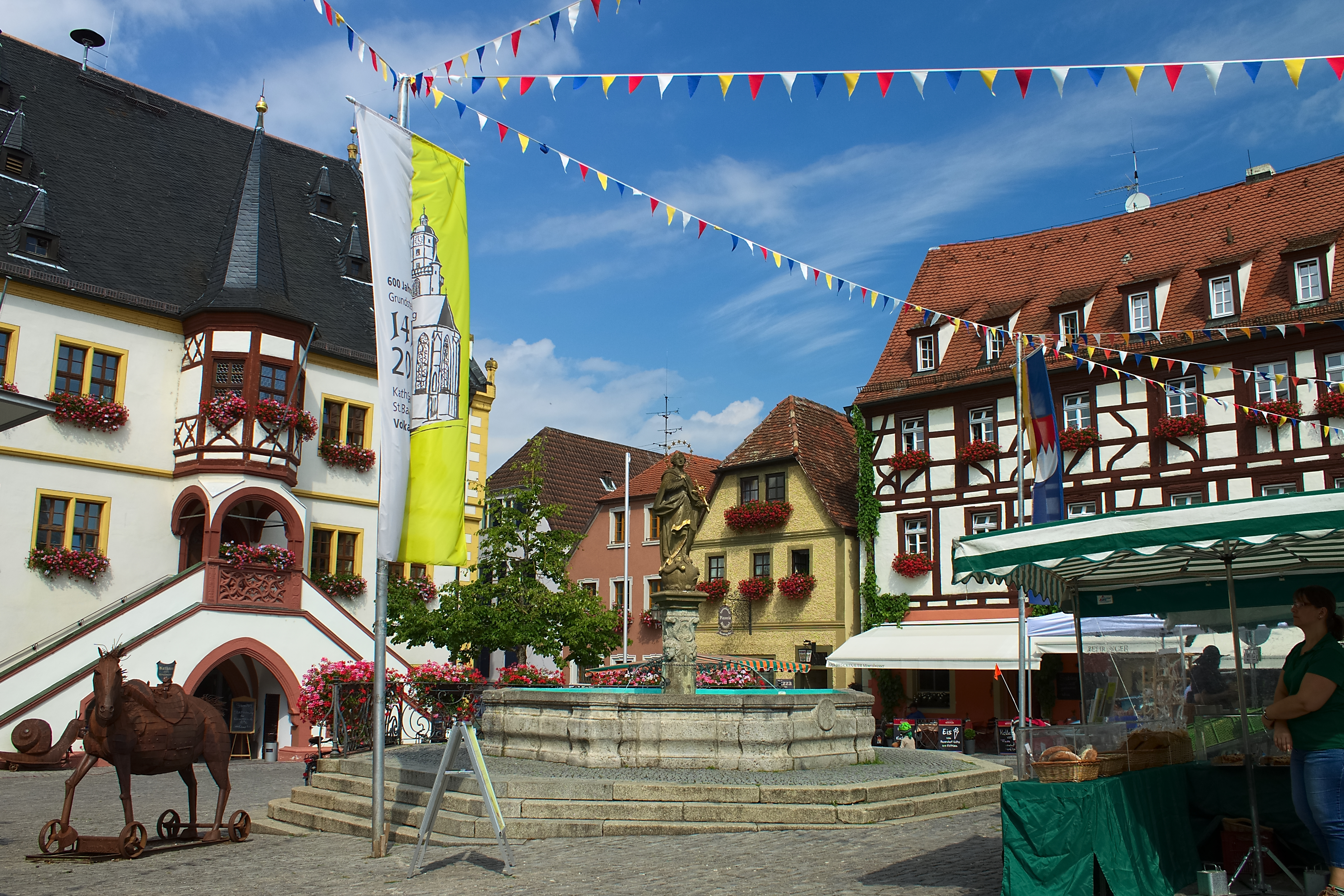 La Franconie, dont les dépliants touristiques insistent volontiers sur le caractère romantique, attire chaque année de nombreux visiteurs. Ses paysages pittoresques et son histoire intéressante, qui se reflète dans l'architecture de ses monuments ainsi que dans les manifestations culturelles, contribuent à la popularité de cette région. De nombreuses bâtisses médiévales sont reliées par la route des châteaux forts qui traverse entièrement la Franconie. La route romantique la parcourt partiellement.